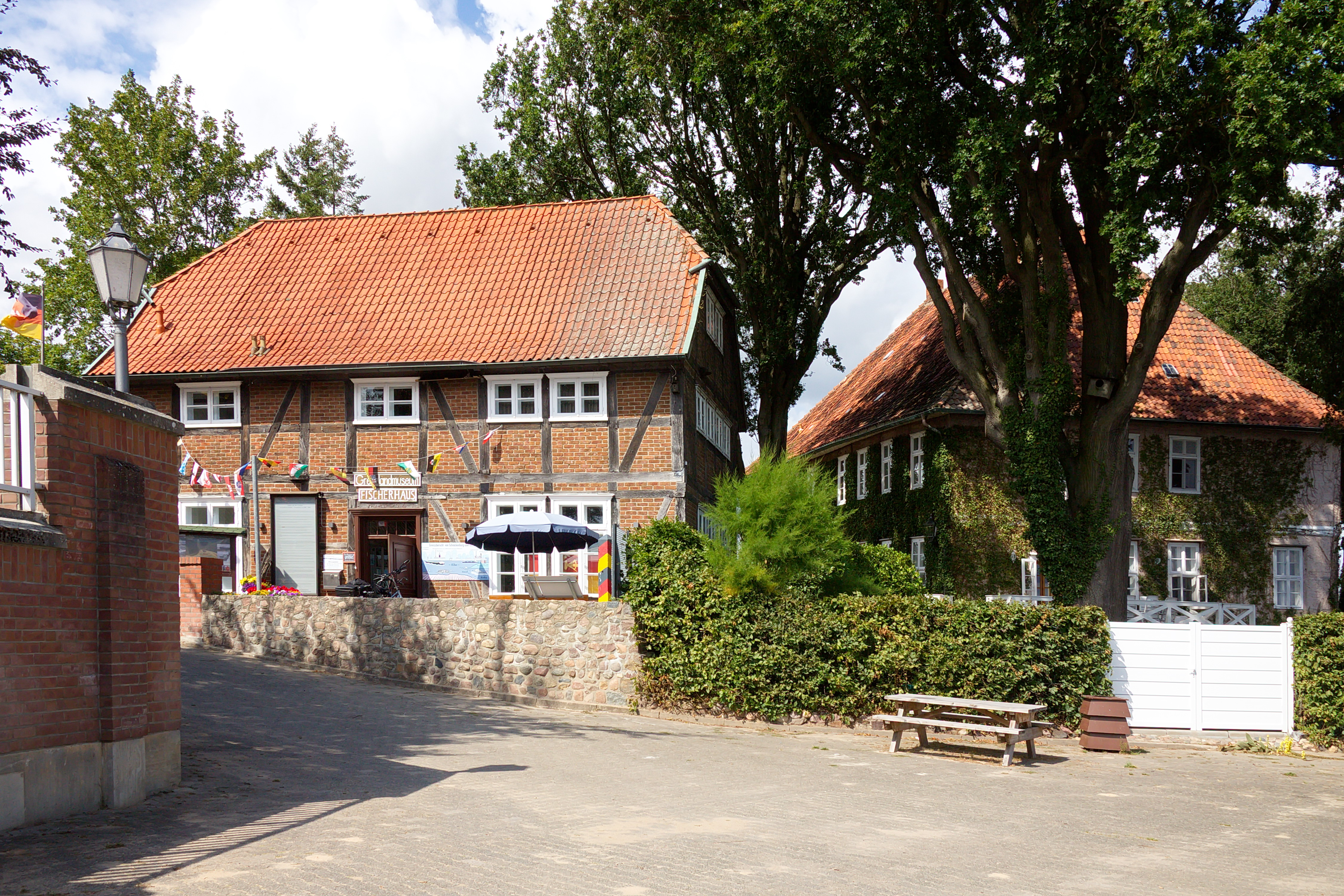 Grenzlandmuseum Fischerhaus in Schnackenburg an der Elbe in Niedersachsen, Deutschland